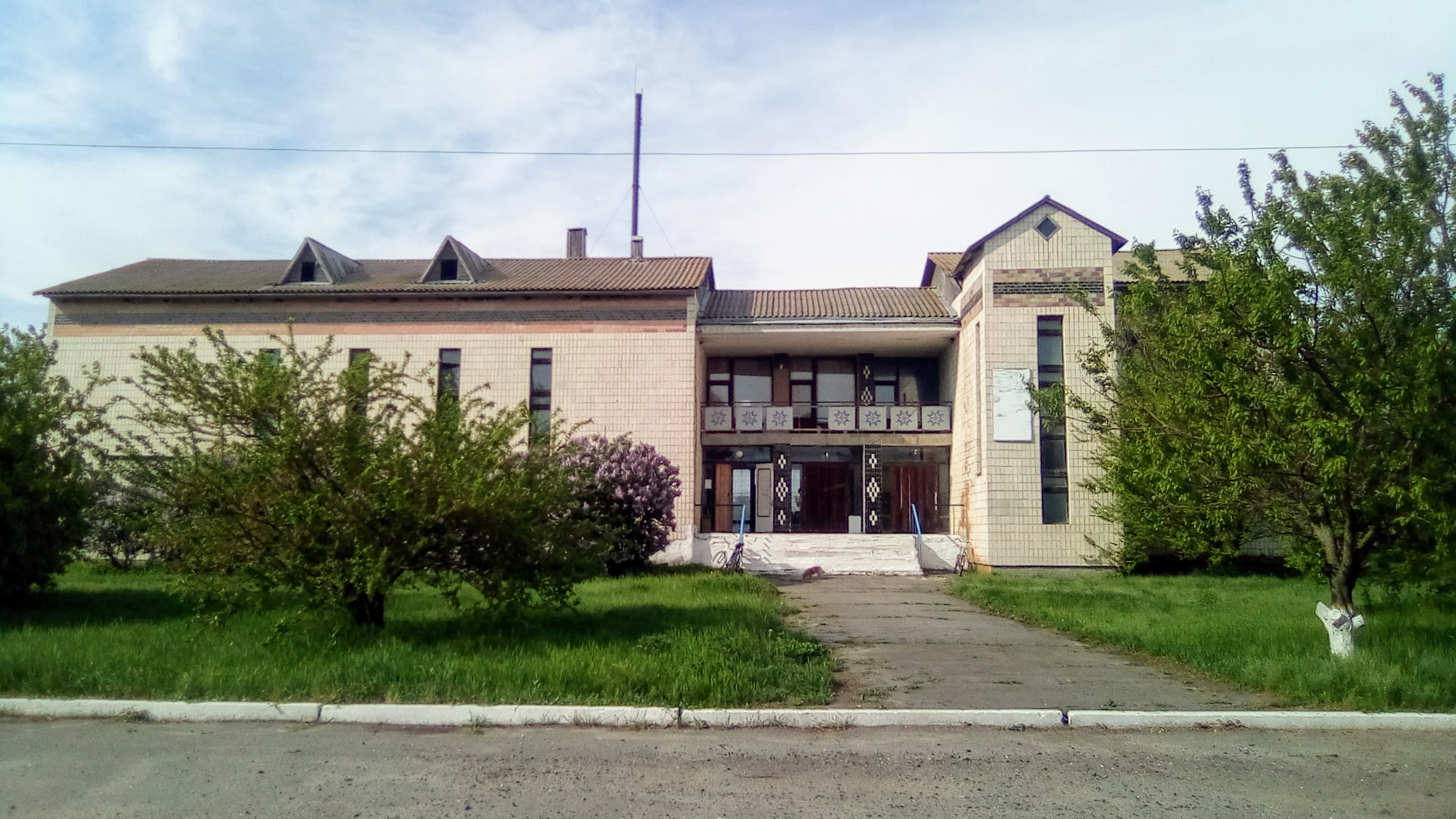 Полтавська область. Лохвицький район, село Пісочки. Будинок культури